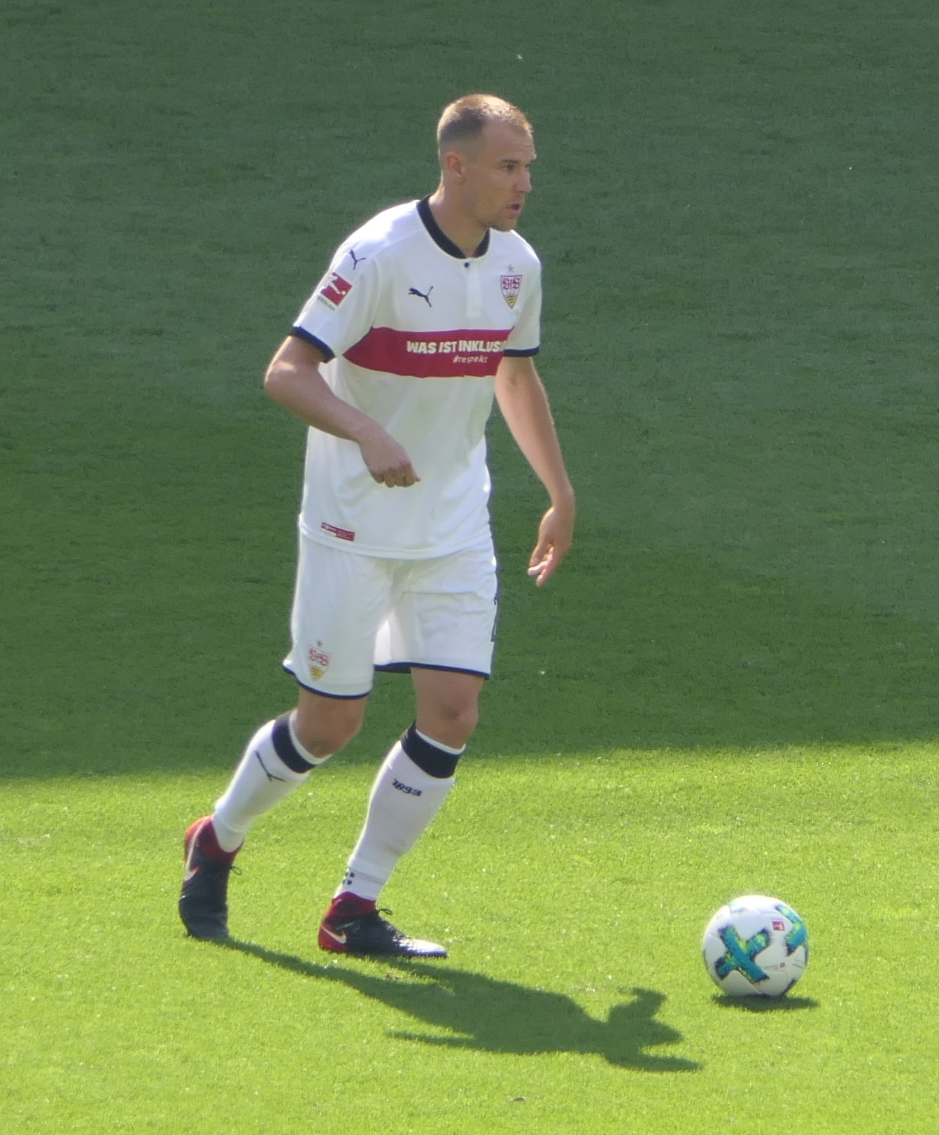 Der Fussballprofi Holger Badstuber im Trikot vom VfB Stuttgart beim Heimspiel gegen den SV Werder Bremen am 21.04.2018.